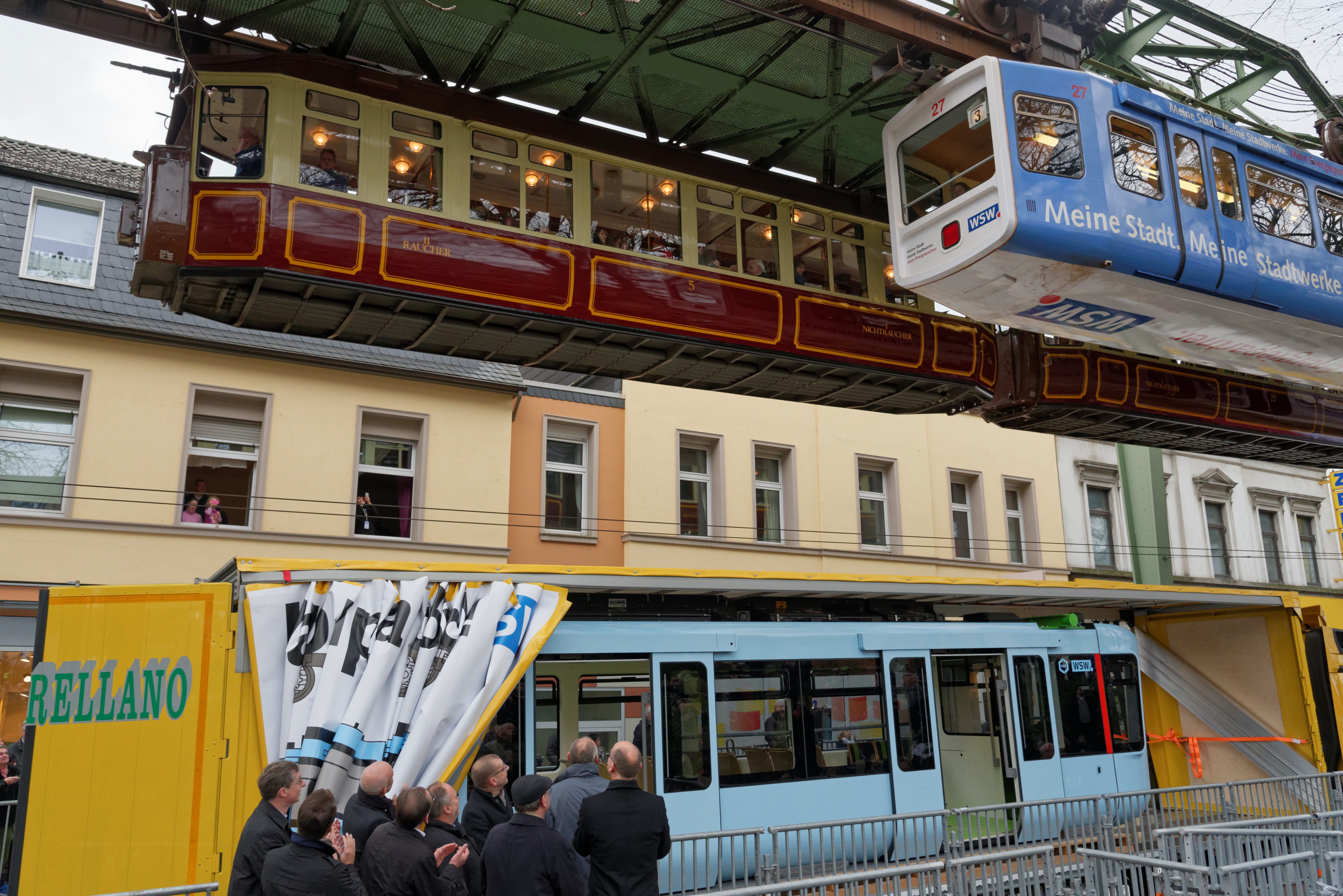 neue Schwebebahn von außen in Wuppertal